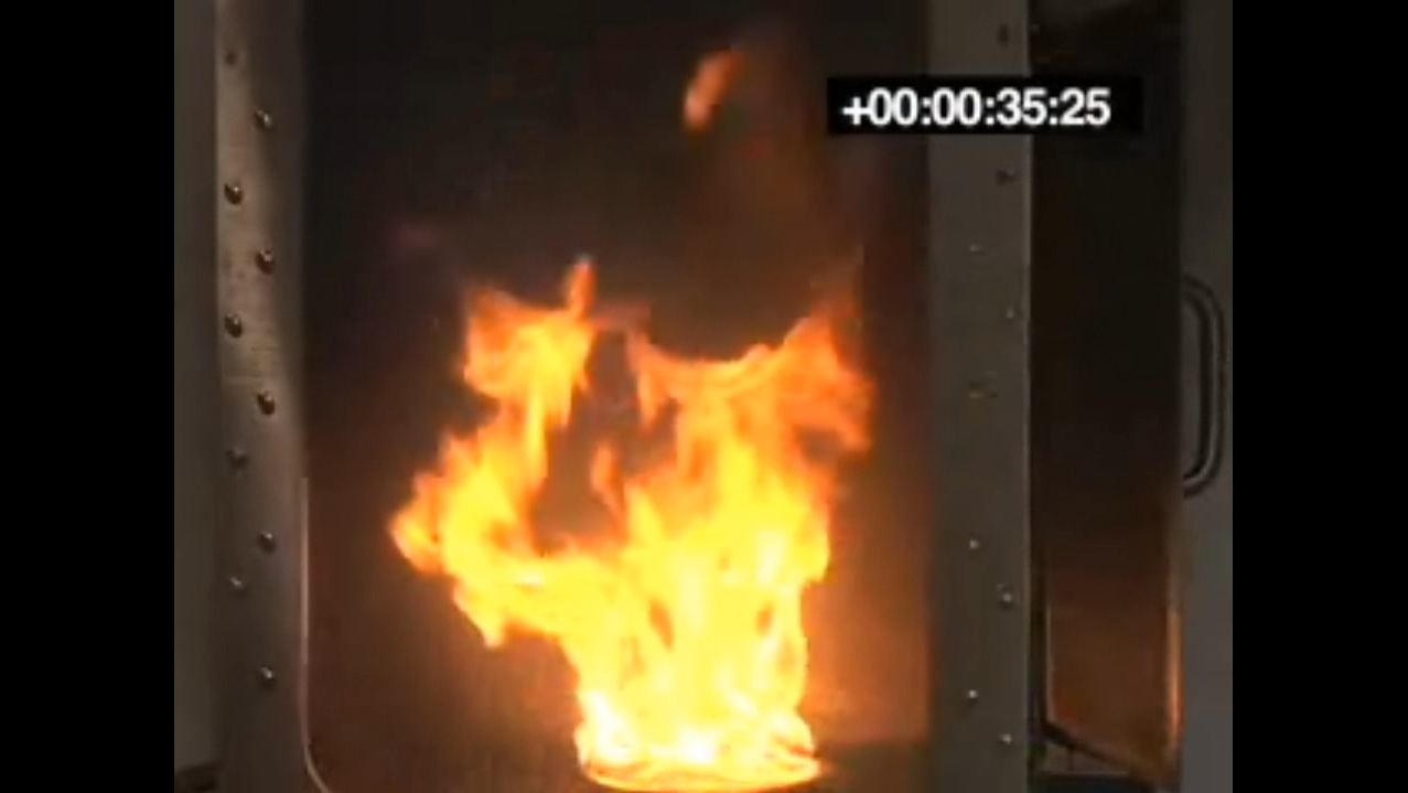 Small enclosure fire test